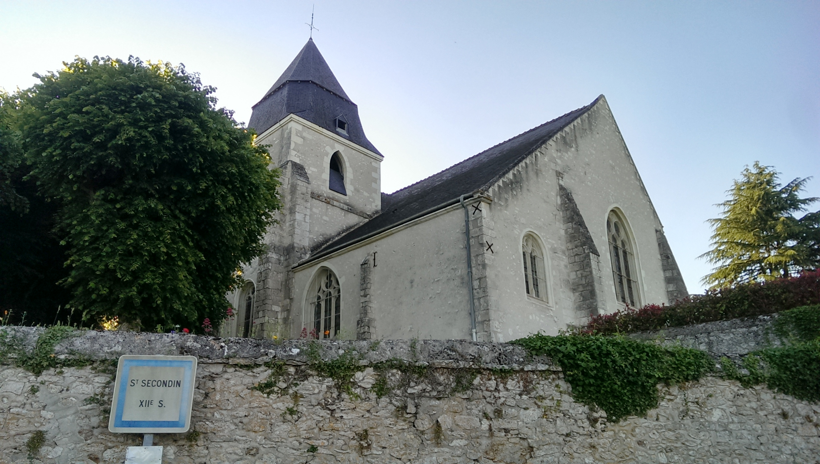 L'église Saint-Secondin, à Molineuf.